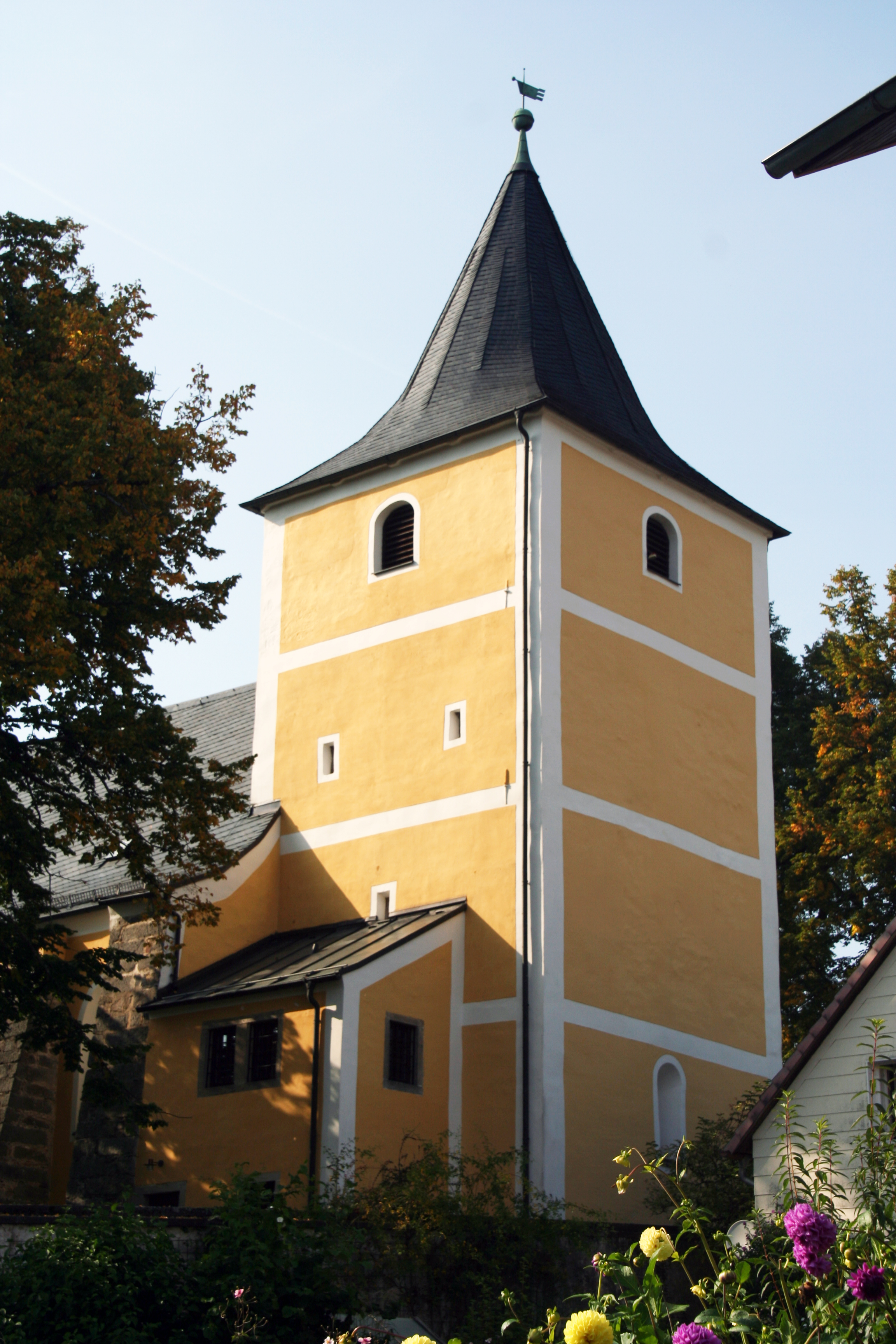 Katholische Filialkirche St. Jakob, LennesriethThis is a photograph of an architectural monument.